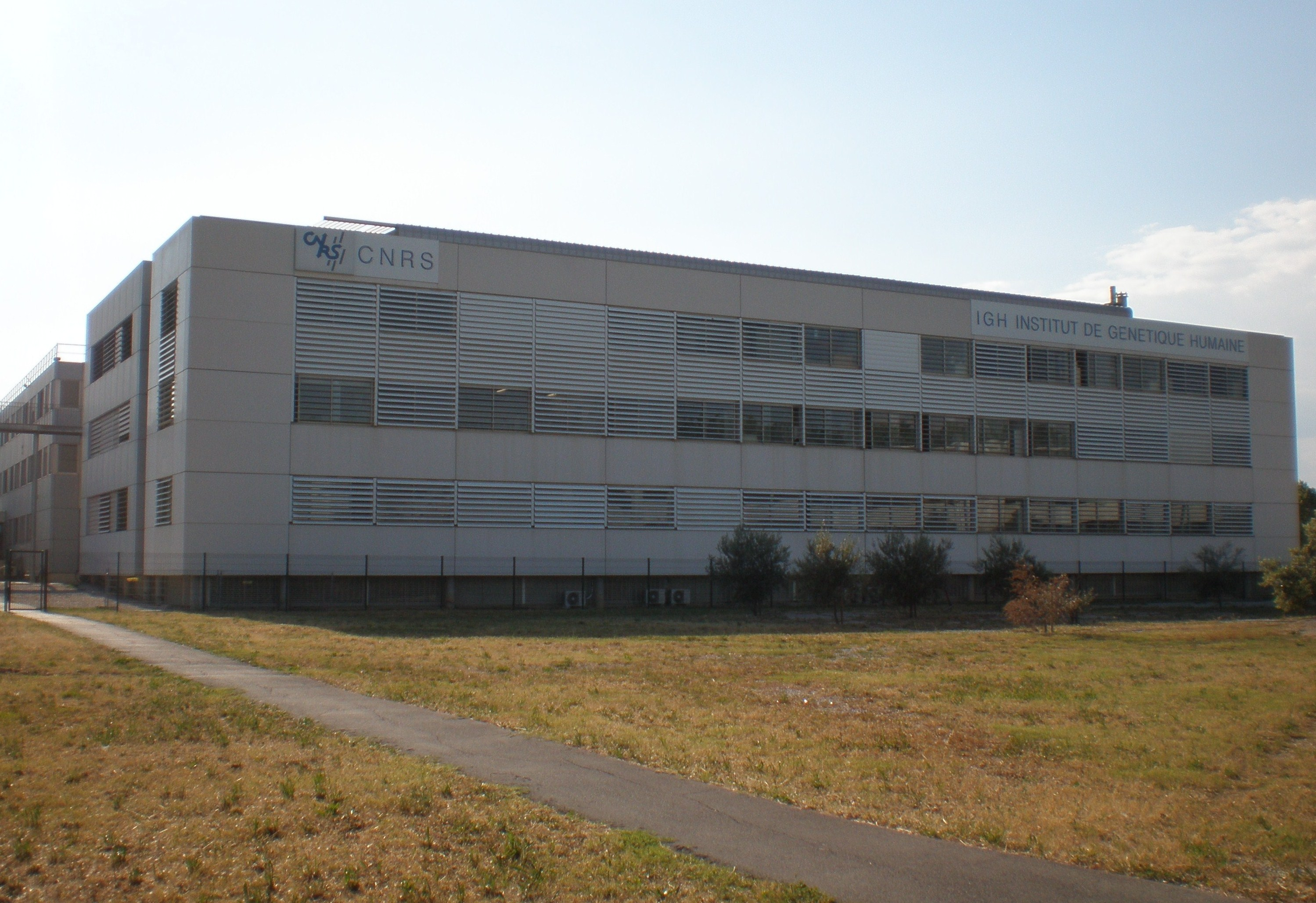 L'Institut de Génétique Humaine à Montpellier (Unité de recherche Université Montpellier 1 et CNRS)